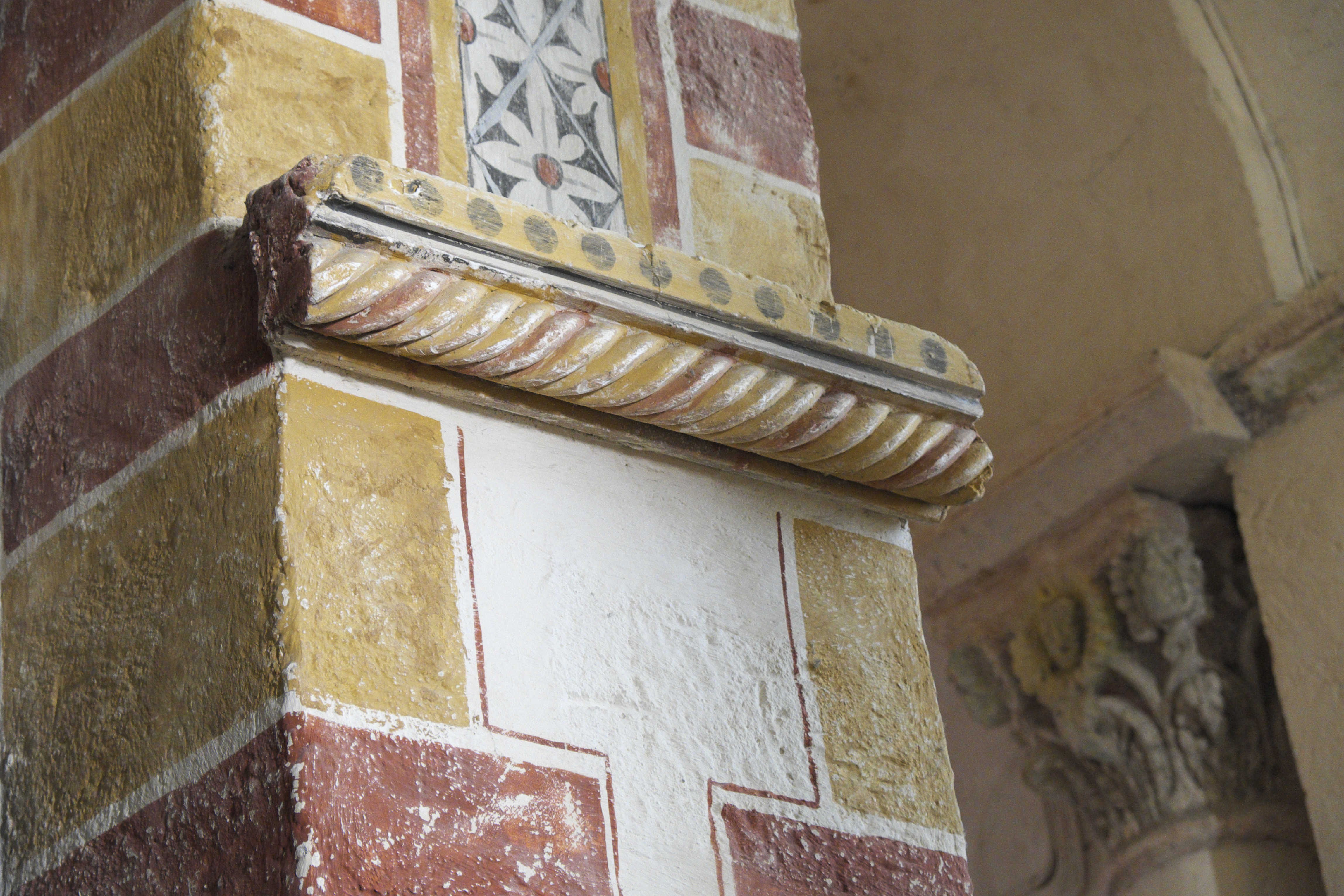 Katholische Pfarrkirche Saint-Jean in Glaine-Montaigut im Département Puy-de-Dôme (Auvergne-Rhône-Alpes/Frankreich), Kämpfer